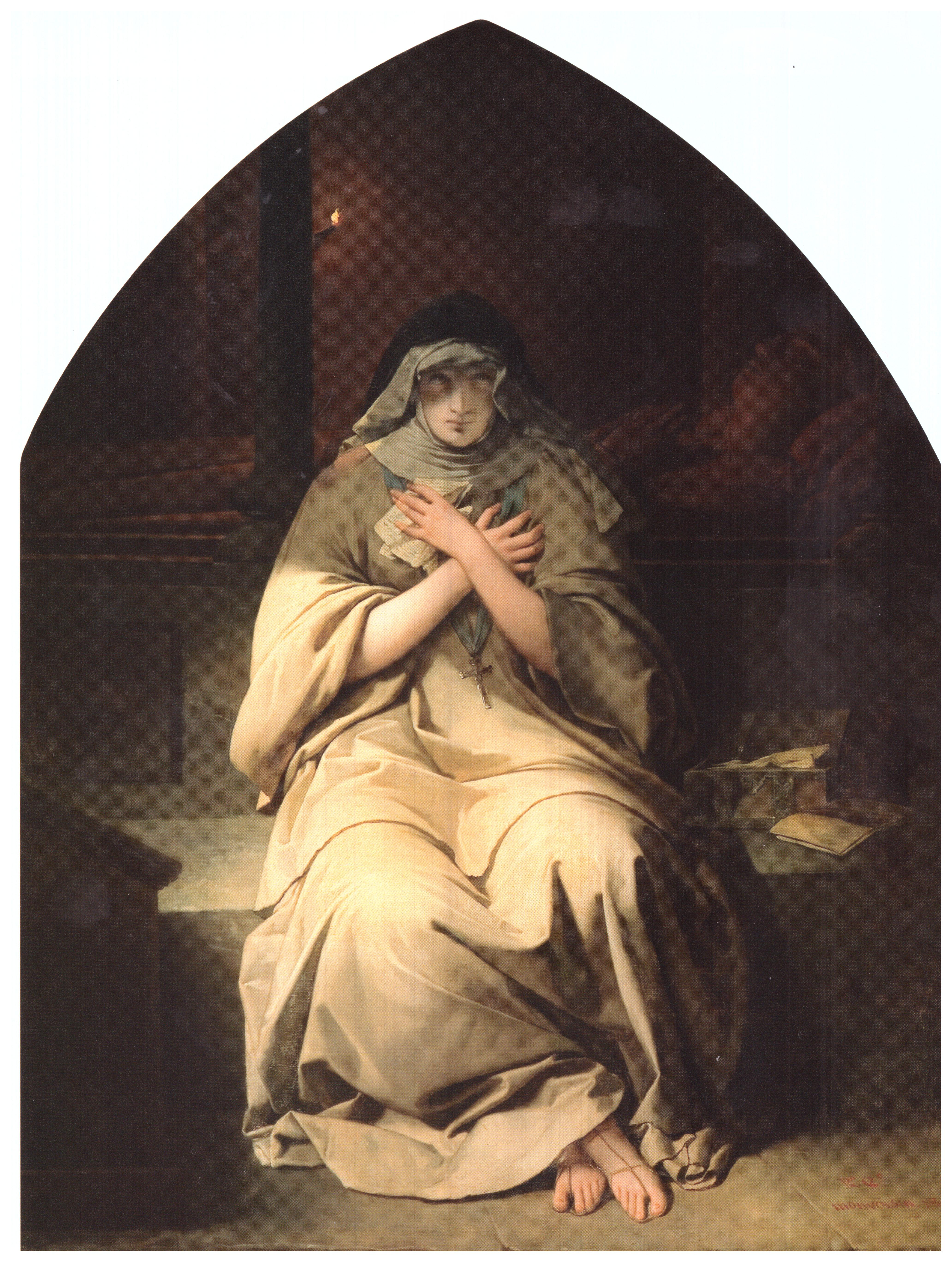 Eloísa en la tumba de Abelardo, del que fue amante primero y luego esposa.